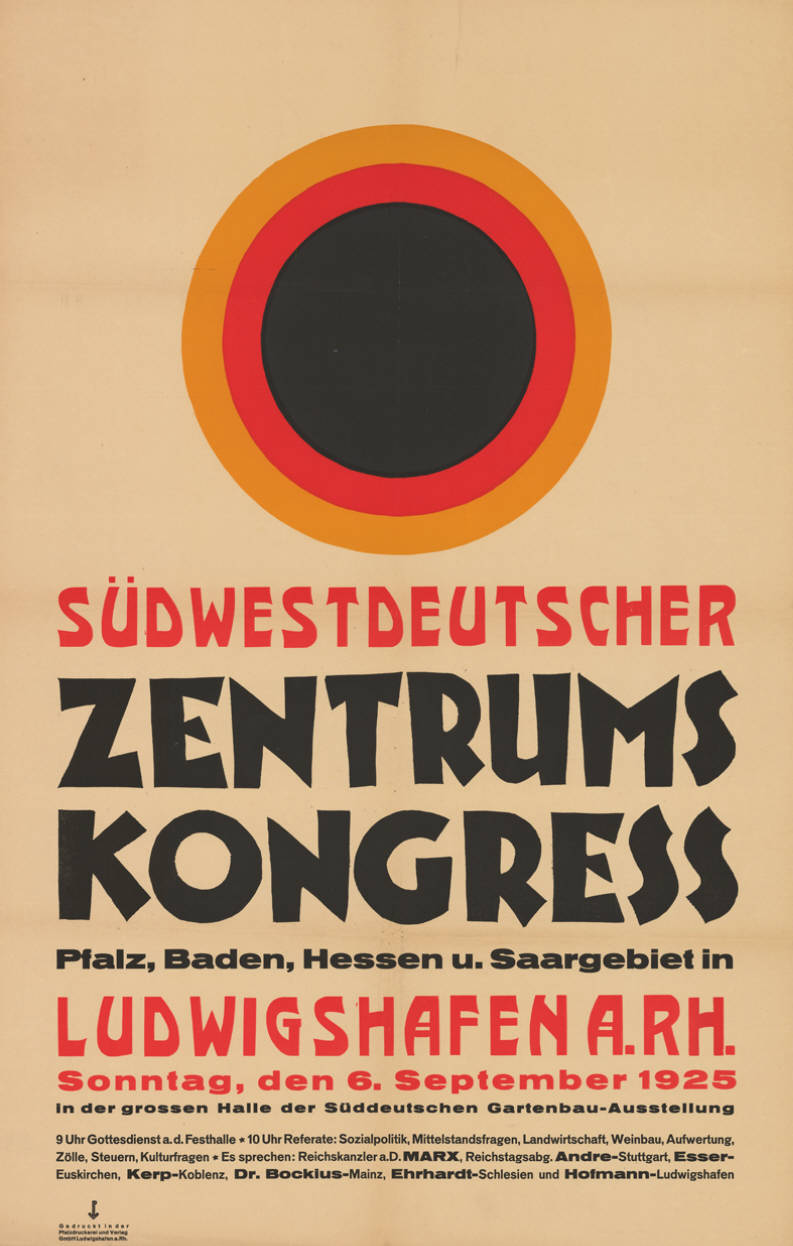 Südwestdeutscher Zetrums Kongress Pfalz, Baden, Hessen u. Saargebiet in Ludwigshafen A. RH. ... in der großen Halle der Süddeutschen Gartenbau-Ausstellung 9 Uhr Gottesdienst a. d. Festhalle 10 Uhr Referate: Sozialpolitik, Mittelstandsfragen, Landwirtschaft, Weinbau, Aufwertung, Zölle, Steuern, Kulturfragen * Es sprechen: Reichskanzler a.D. Marx, Reichstagsabg. Andre-Stuttgart, Esser- Euskirchen, Kerp-Koblenz, Dr. Bockius-Mainz, Ehrhardt-Schlesien und Hofmann-Ludwigshafen Abbildung: Kreis in schwarz, rot, gold Plakatart: Ankündigungsplakat Drucker_Druckart_Druckort: Pfalzdruckerei und Verlag GmbH, Ludwigshafen a. Rh. Objekt-Signatur: 10-043:24 Bestand: Plakatsammlung Weimarer Republik/NS-Zeit (10-043) GliederungBestand10-18: Zentrum Lizenz: KAS/ACDP 10-043:24 CC-BY-SA 3.0 DE